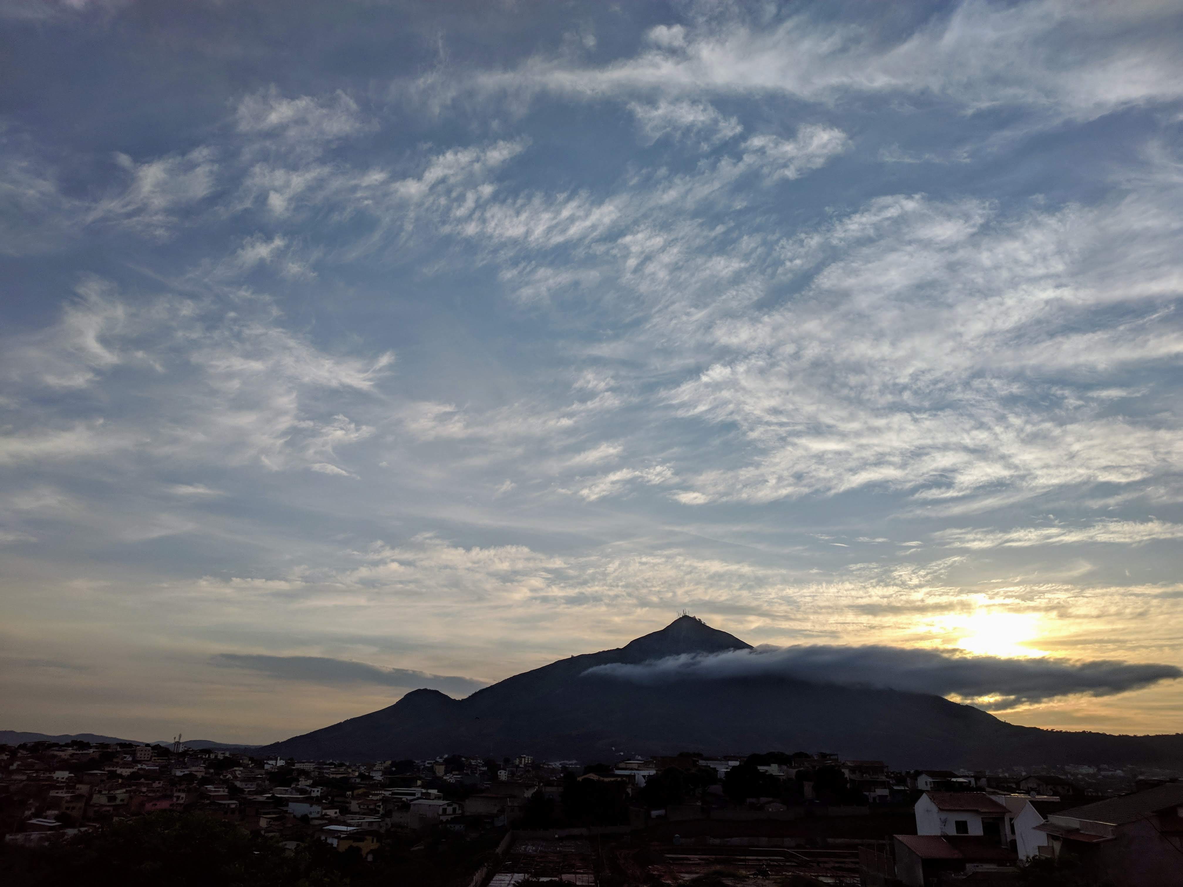 Cultural property Q10349476, Governador Valadares, Minas Gerais, Brazil Q10349476, P727: iPatrimônio ID: governador-valadares-pico-do-ibituruna